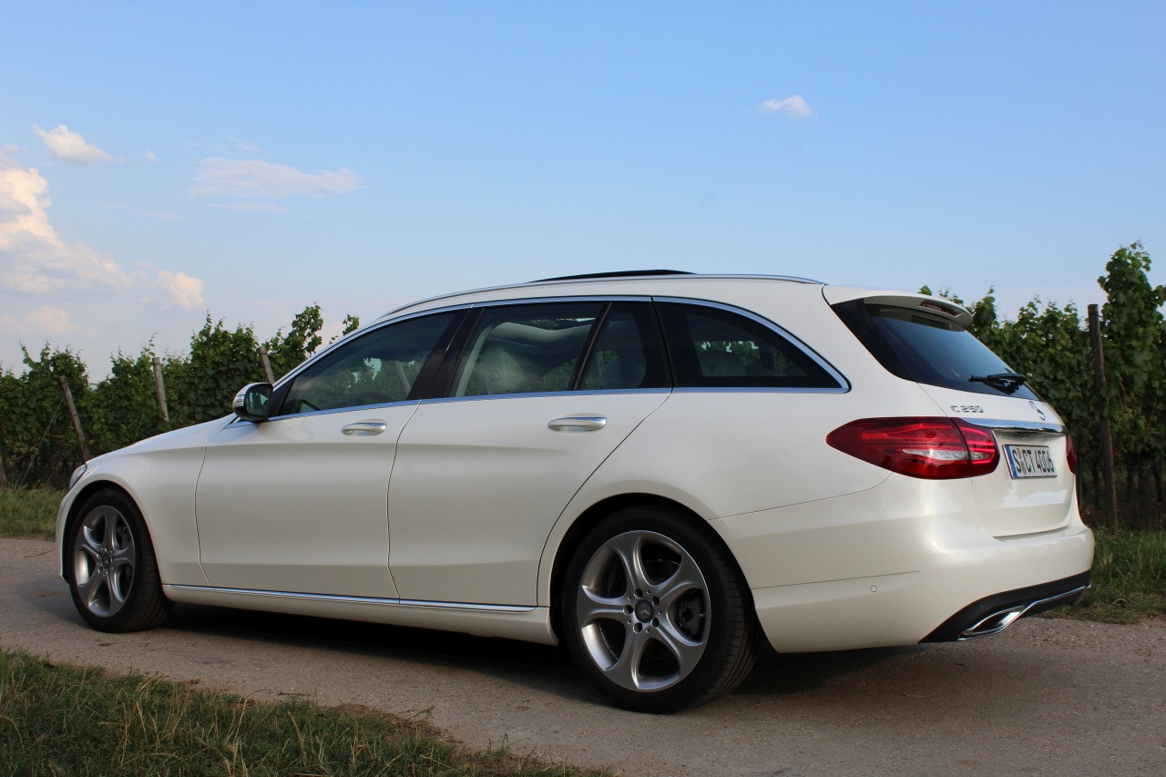 das neue T-Modell C-Klasse